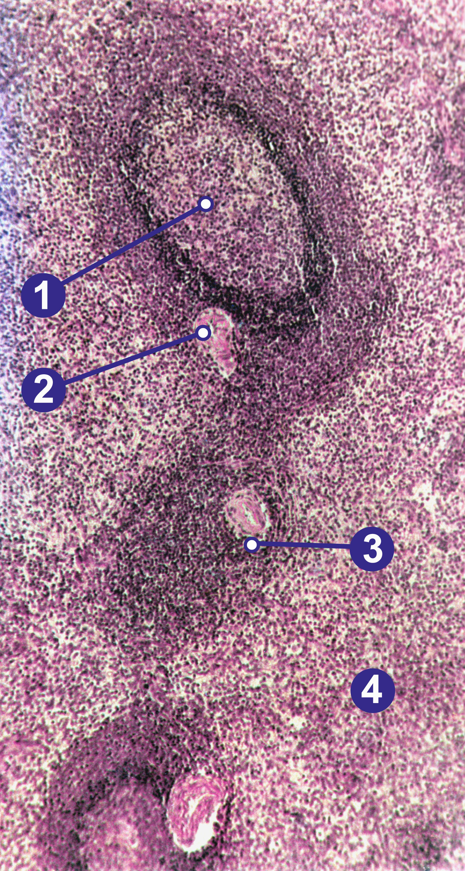 Histologisches Präparat der Milz (Mensch), HE-Färbung, Objektiv 56x: (1) Sekundärer Lymphfollikel (weiße Pulpa), (2) Zentralarterie, (3) Periarterielle Lymphscheide, (4) rote Pulpa